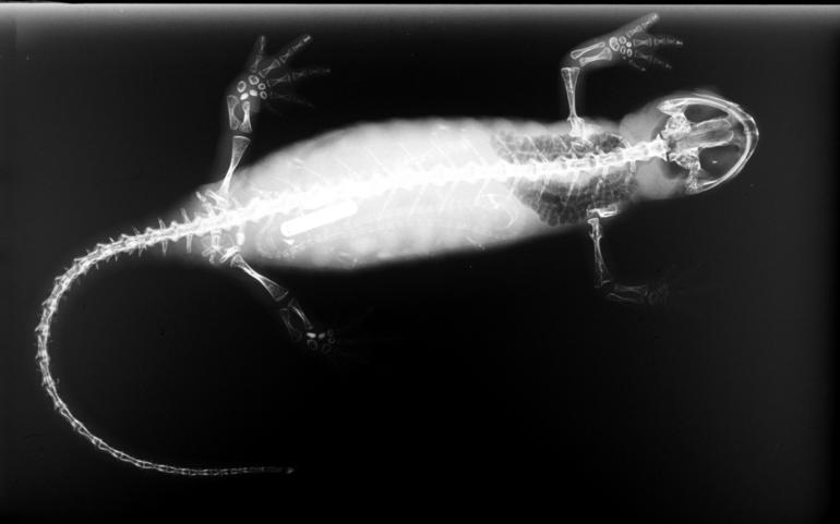 Salamandra lanzai